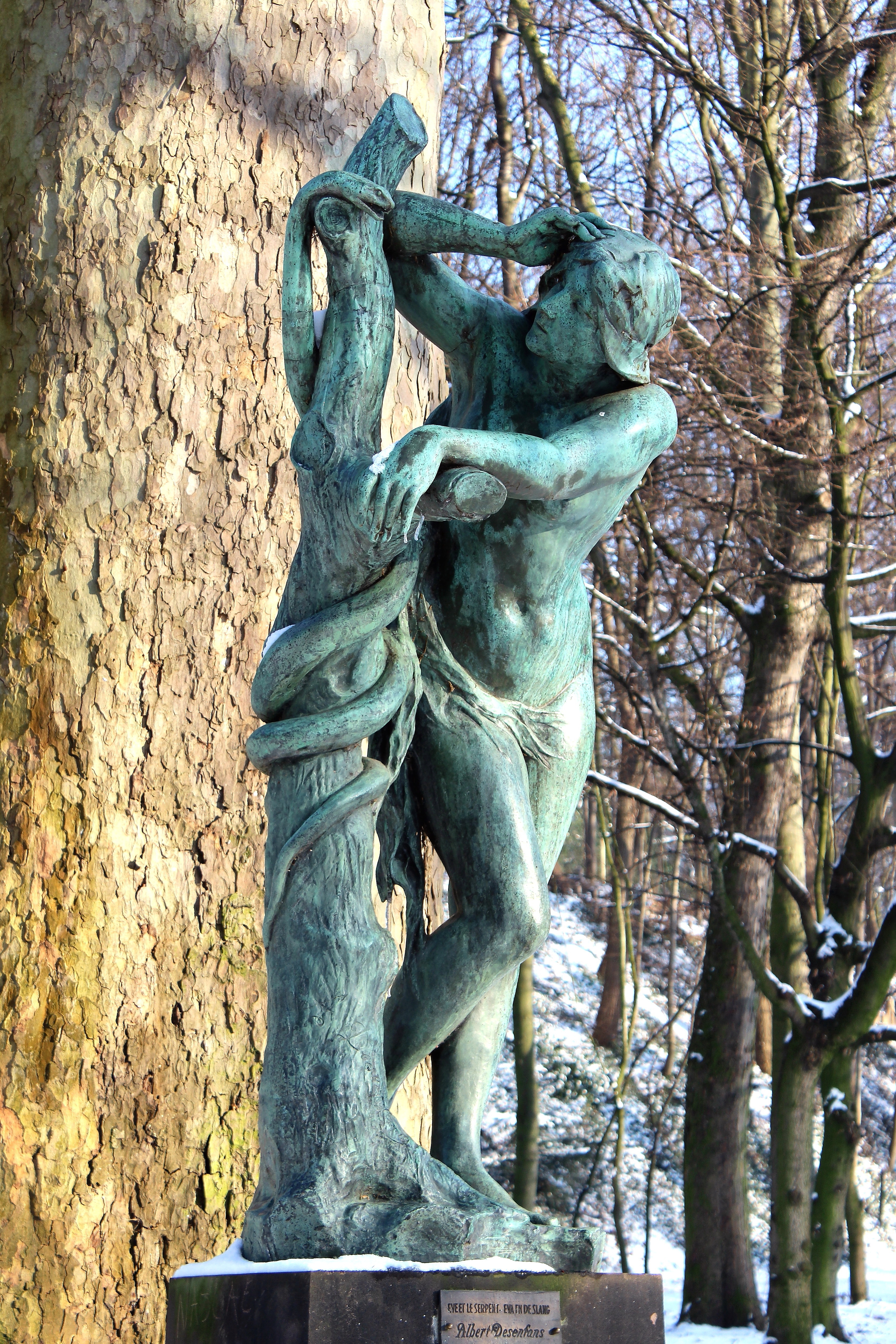 Parc Josaphat, Schaerbeek (Bruxelles), Belgique. Eve et le serpent, oeuvre d'Albert Desenfans